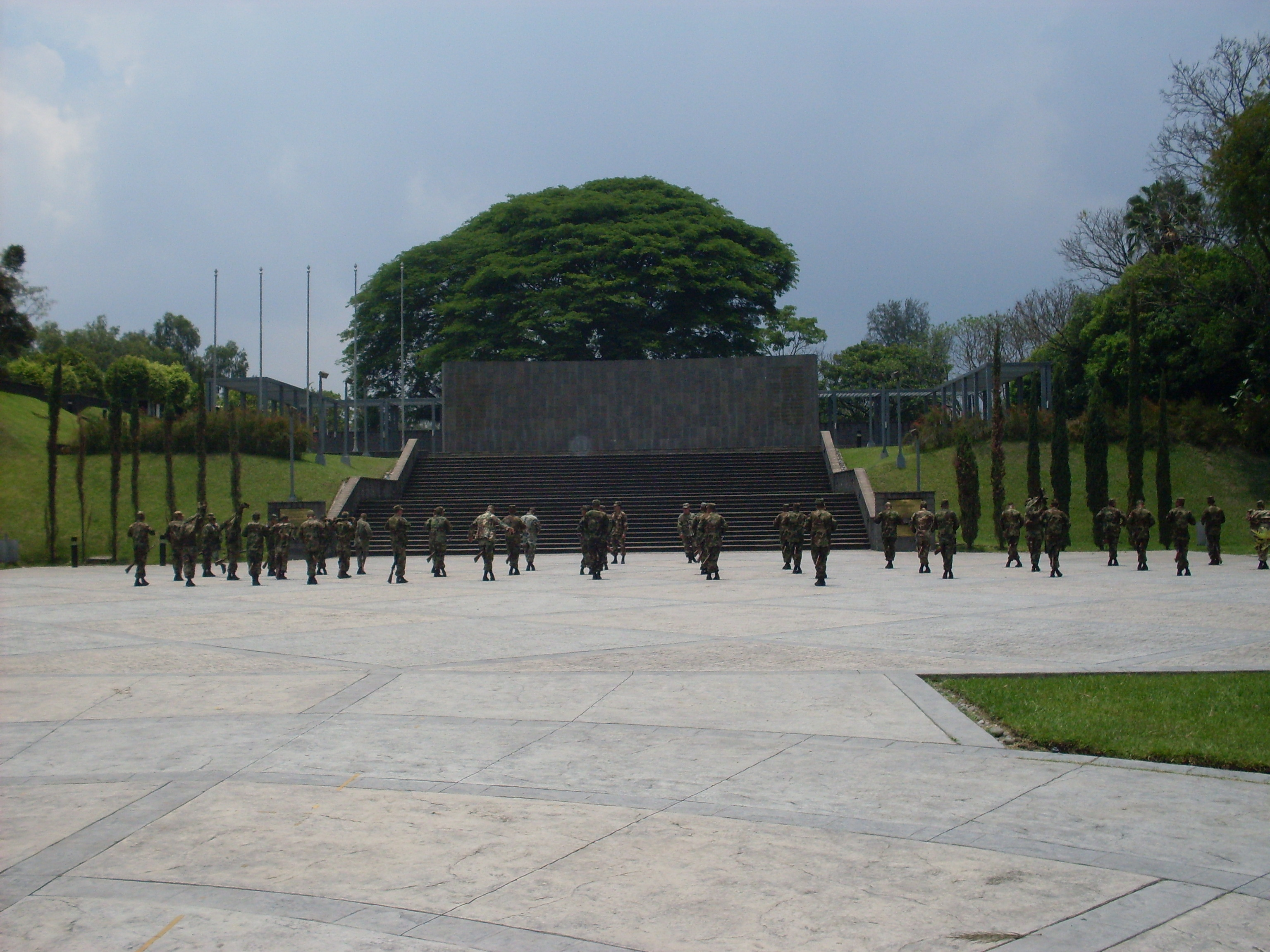 Monumento de los Próceres Nacionales y Plaza Memorial en las instalaciones del Cuartel El Zapote en San Salvador.